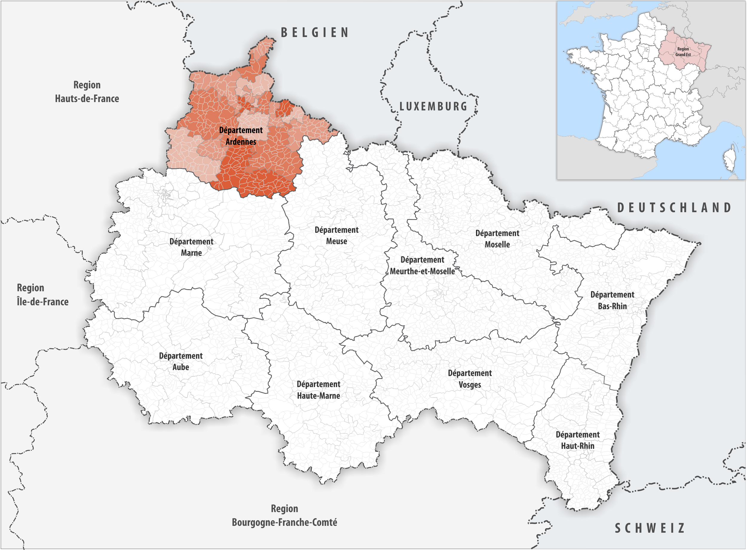 Lage des Departements Ardennes